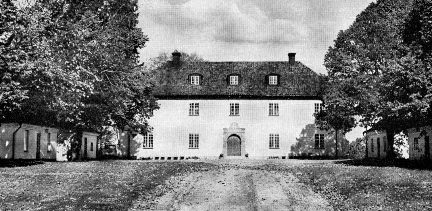 Huvudbyggnaden på Brunnsholms herrgård, Enköpings-Näs socken